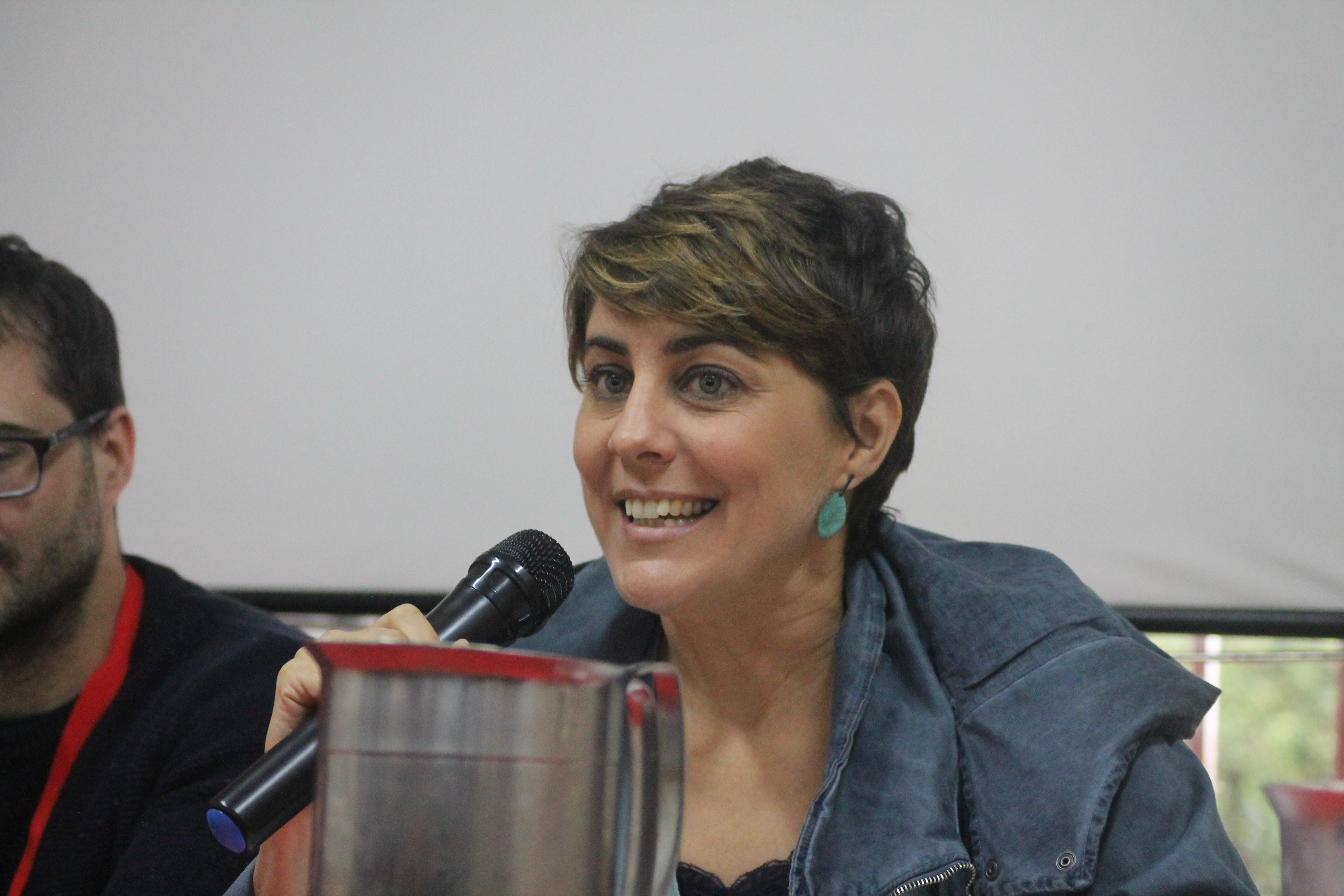 Escuela de Verano PCM